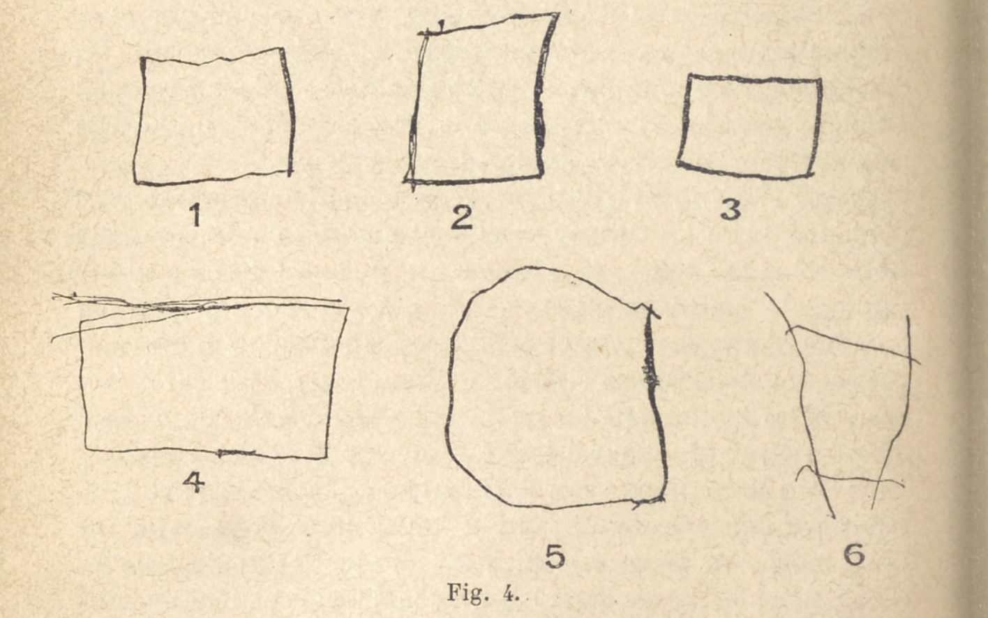 Illustration d'article dans L'Année psychologique